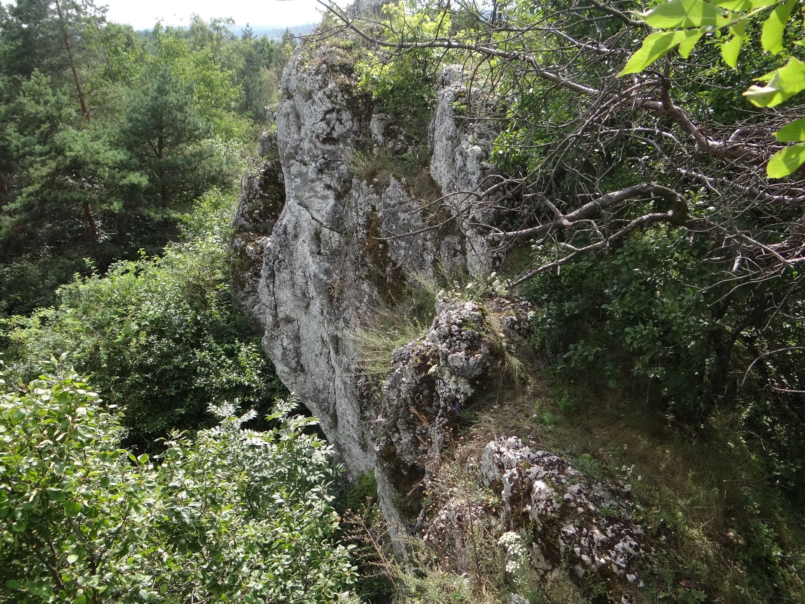 Straszykowe Skały na szczycie Straszykowej Góry